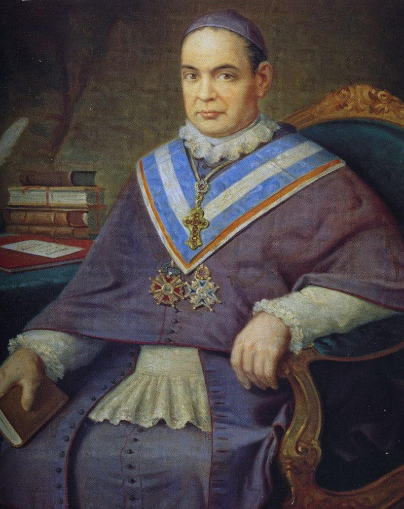 Retrato del eclesiástico español Antonio María Claret (1807-1870), que llegó a ser confesor de la reina Isabel II de España, arzobispo de Santiago de Cuba, arzobispo titular de Trajanópolis in Rhodope, y fundador de la congregación religiosa católica de los Misioneros Hijos del Inmaculado Corazón de María (Misioneros Claretianos).